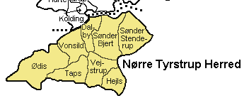 Nørre Tyrstrup Herred, Vejle Amt, Denmark Map by Svend-Erik Christiansen , edited by Nico-dk.